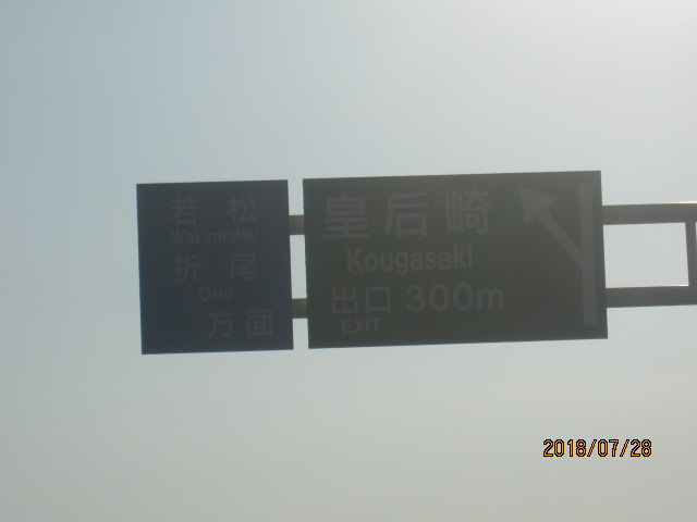 皇后崎ランプの標識。